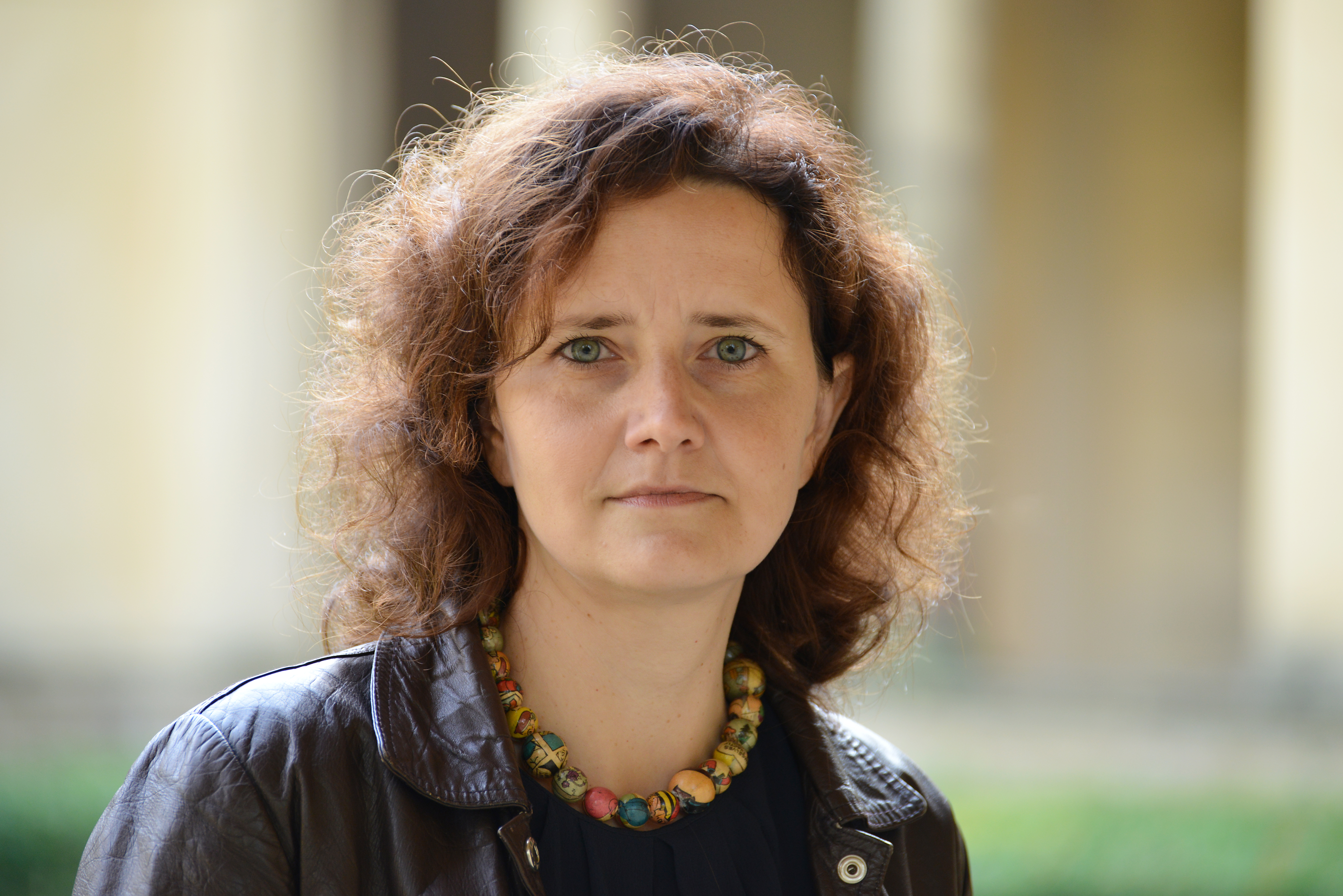 Autorin Julia Schoch